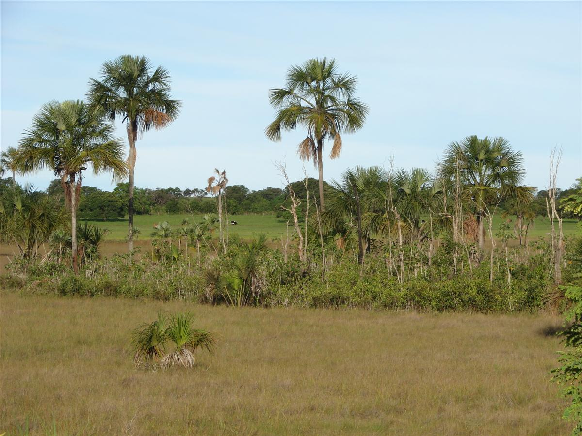 Barreiras-BA